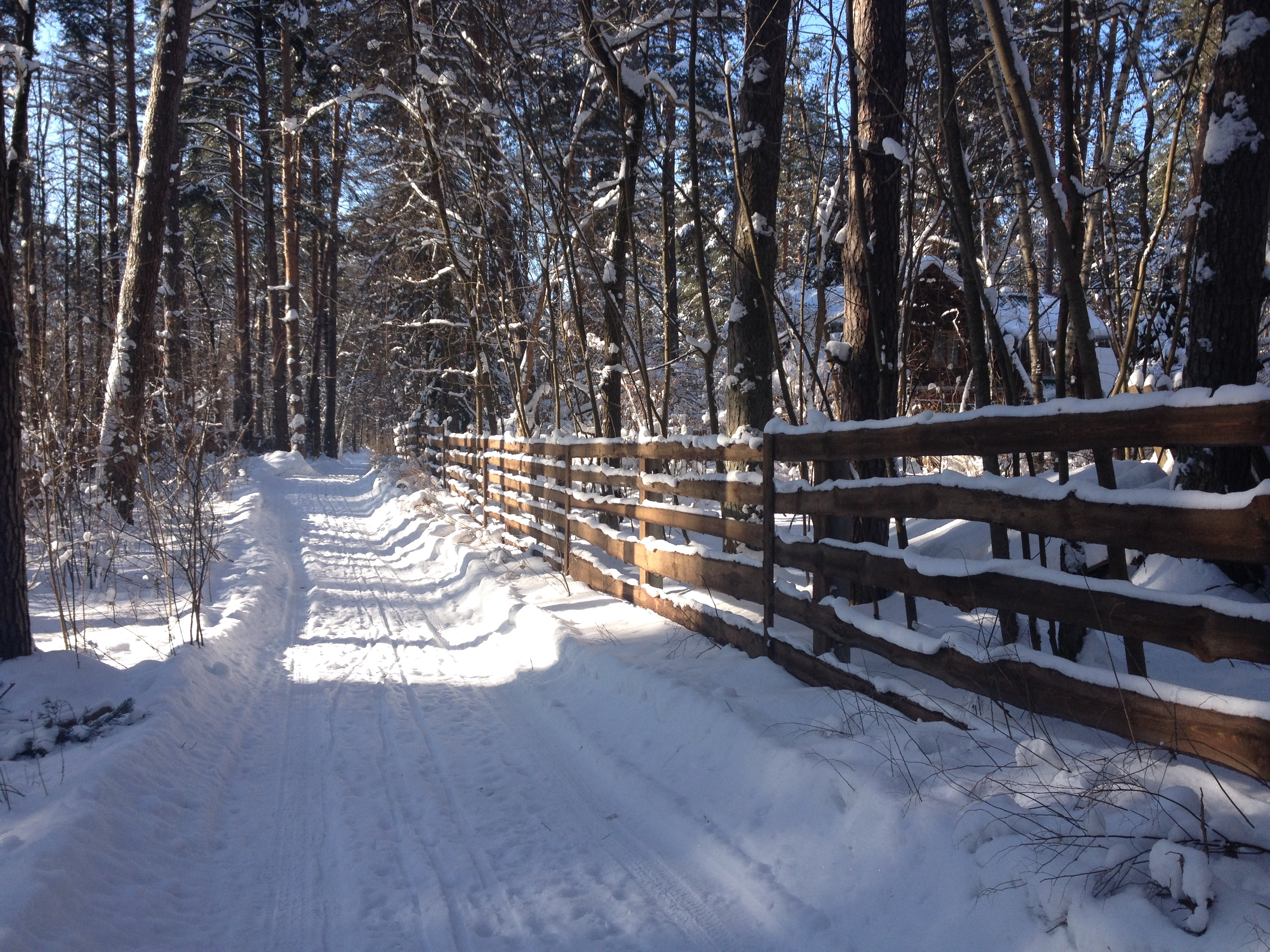 Улица в дачном товариществе "Советский Художник" в посёлке Пески, Коломенский район, Московская область. 2018 год.